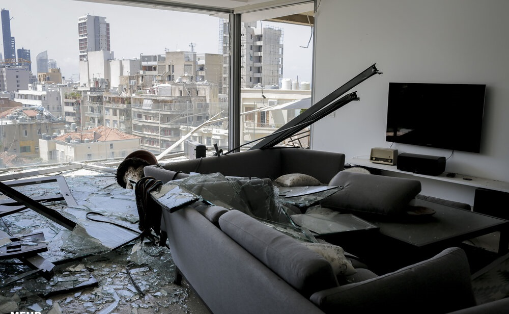 خسارات ها بعد از انفجار بیروت